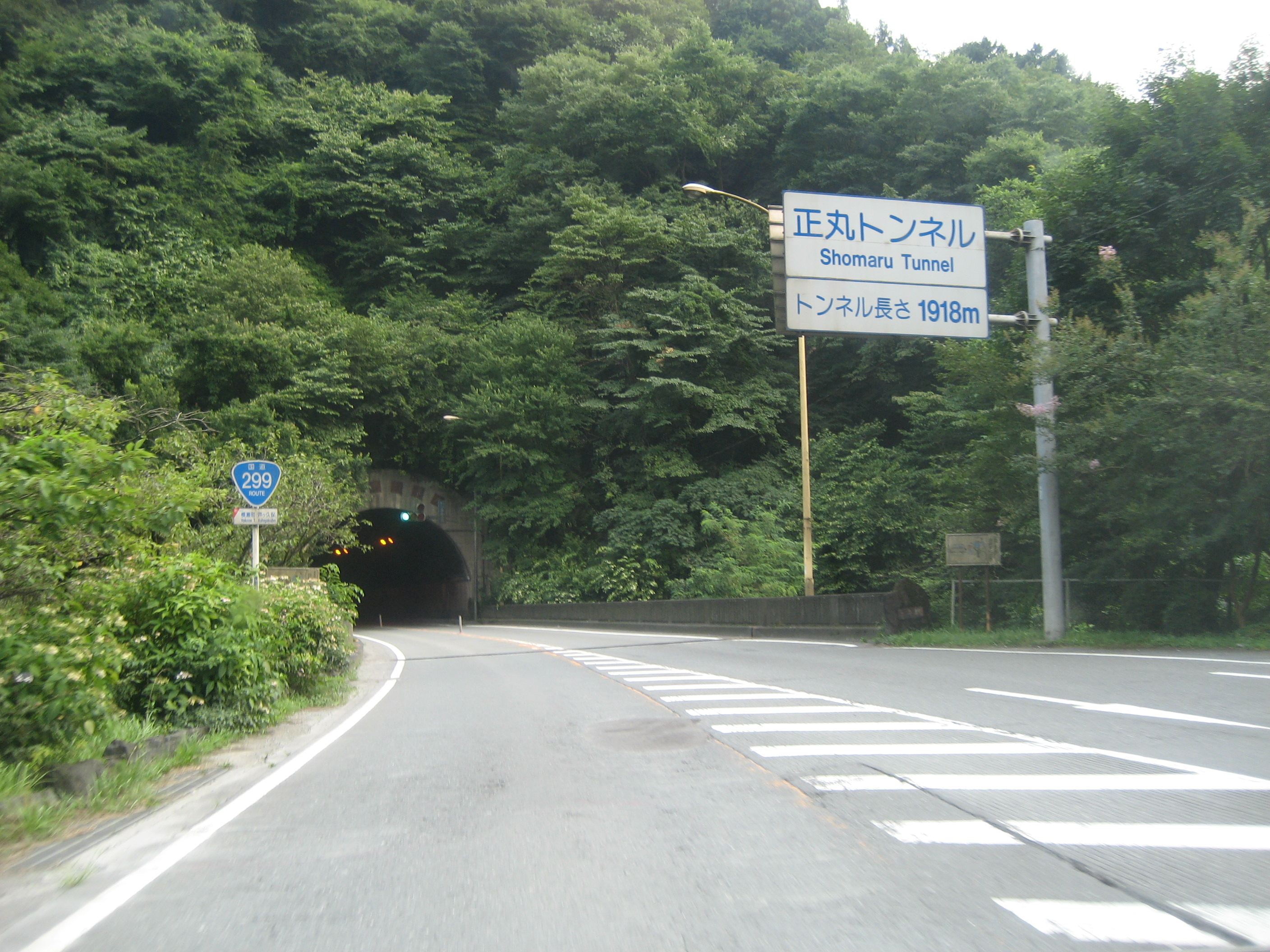 国道299号線正丸トンネル埼玉県秩父郡横瀬町側を撮影